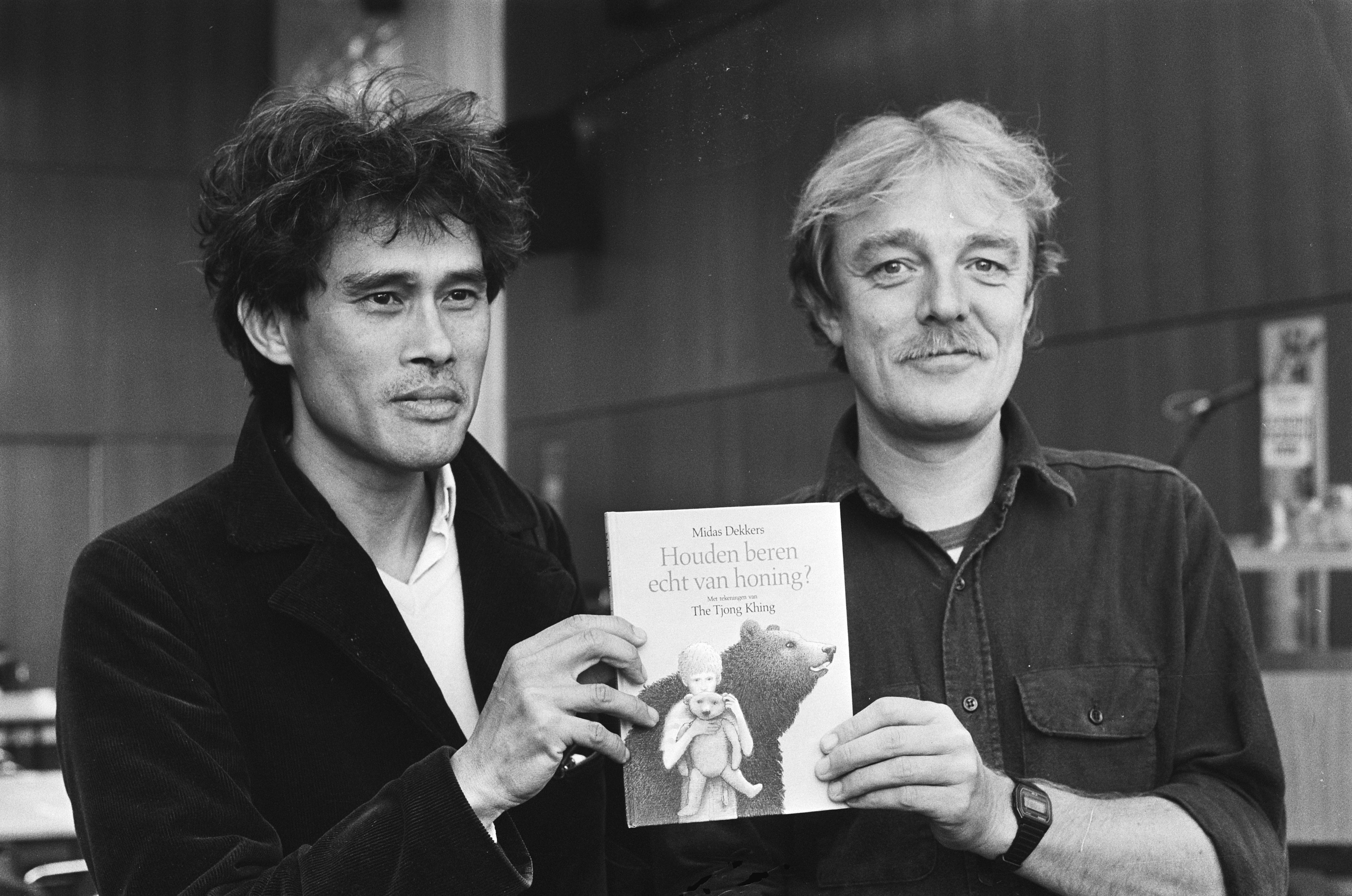 De presentatie van het kinderboekenweekgeschenk 1985 'Houden beren echt van honing?'. De auteur van het boek is Midas Dekkers en de illustrator is Gouden Penseelwinnaar Thé Tjong-Khing